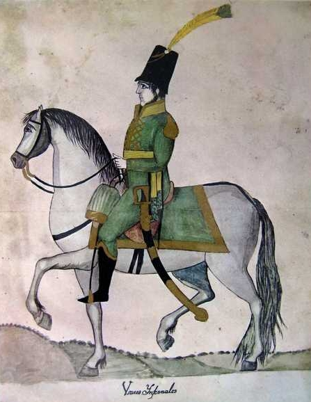 Oficial del escuadron de Husares de Nuñez